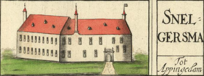 Snelgersma